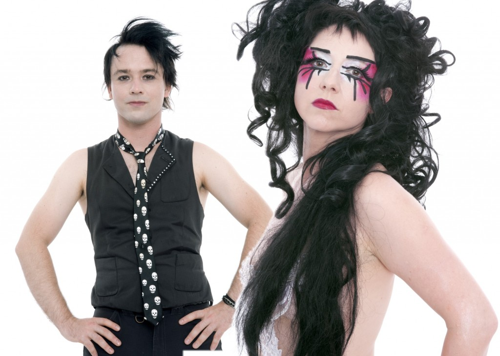 Pressefotos des Musikduos Schneewitchen (Sängerin und Songwriterin: Marianne Iser; Musiker: Thomas Duda) für das im August 2012 erschienene Album Keine Sekunde Schweigen; Fotograf: Ralf Mohr ...